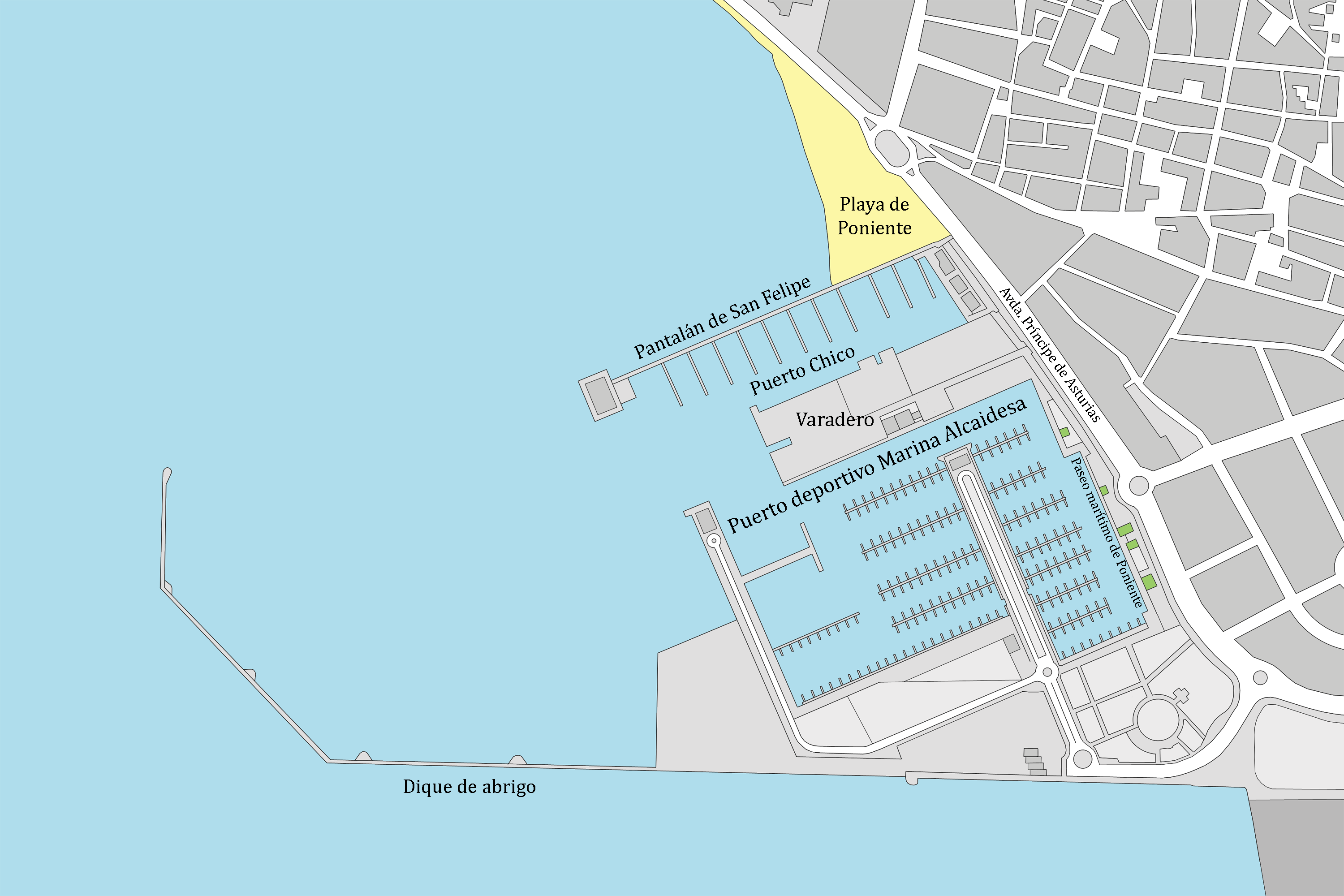 Puerto de La Línea de la Concepción, Andalucía, España.